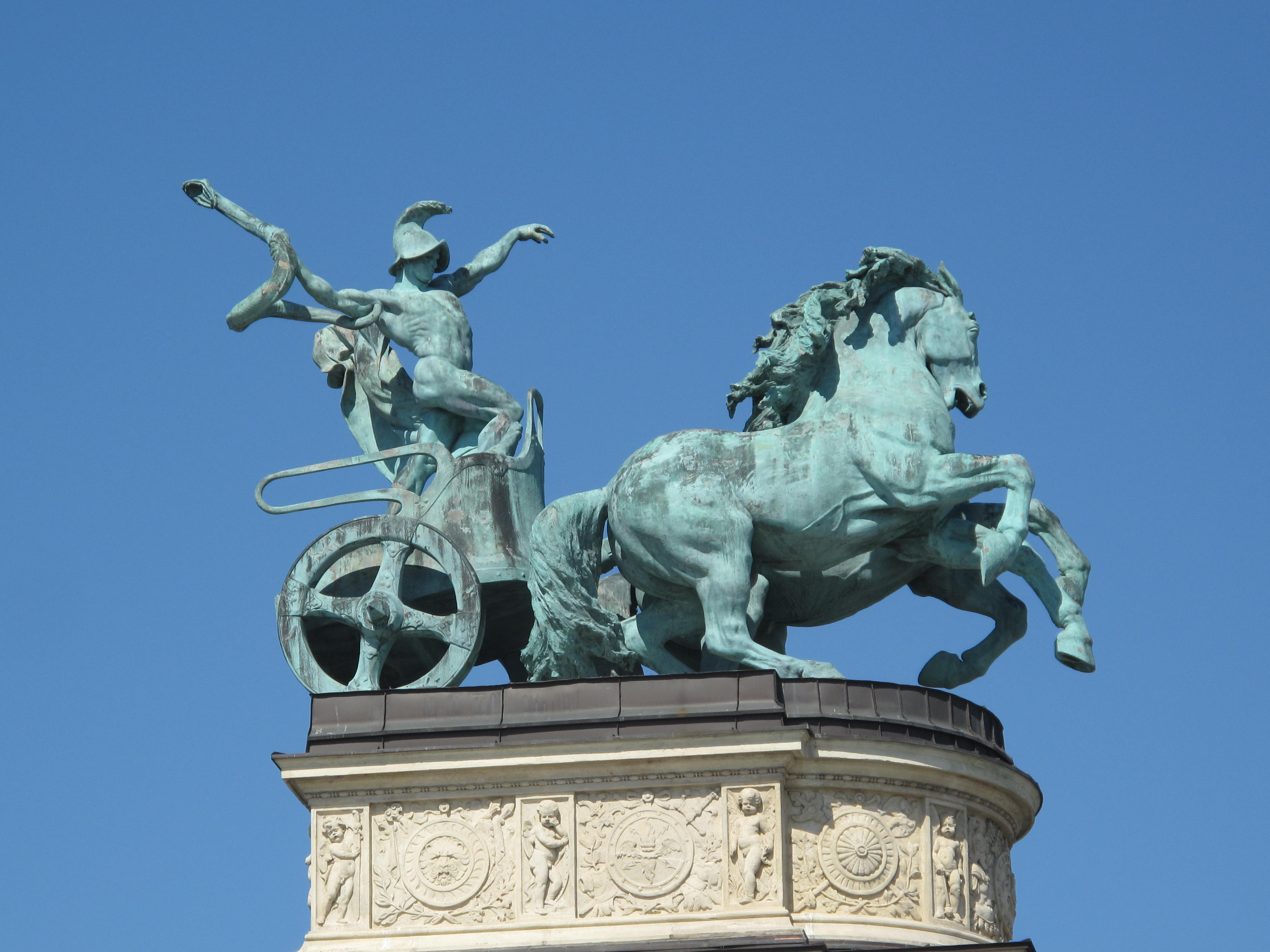 Náměstí Hrdinů, Budapešť